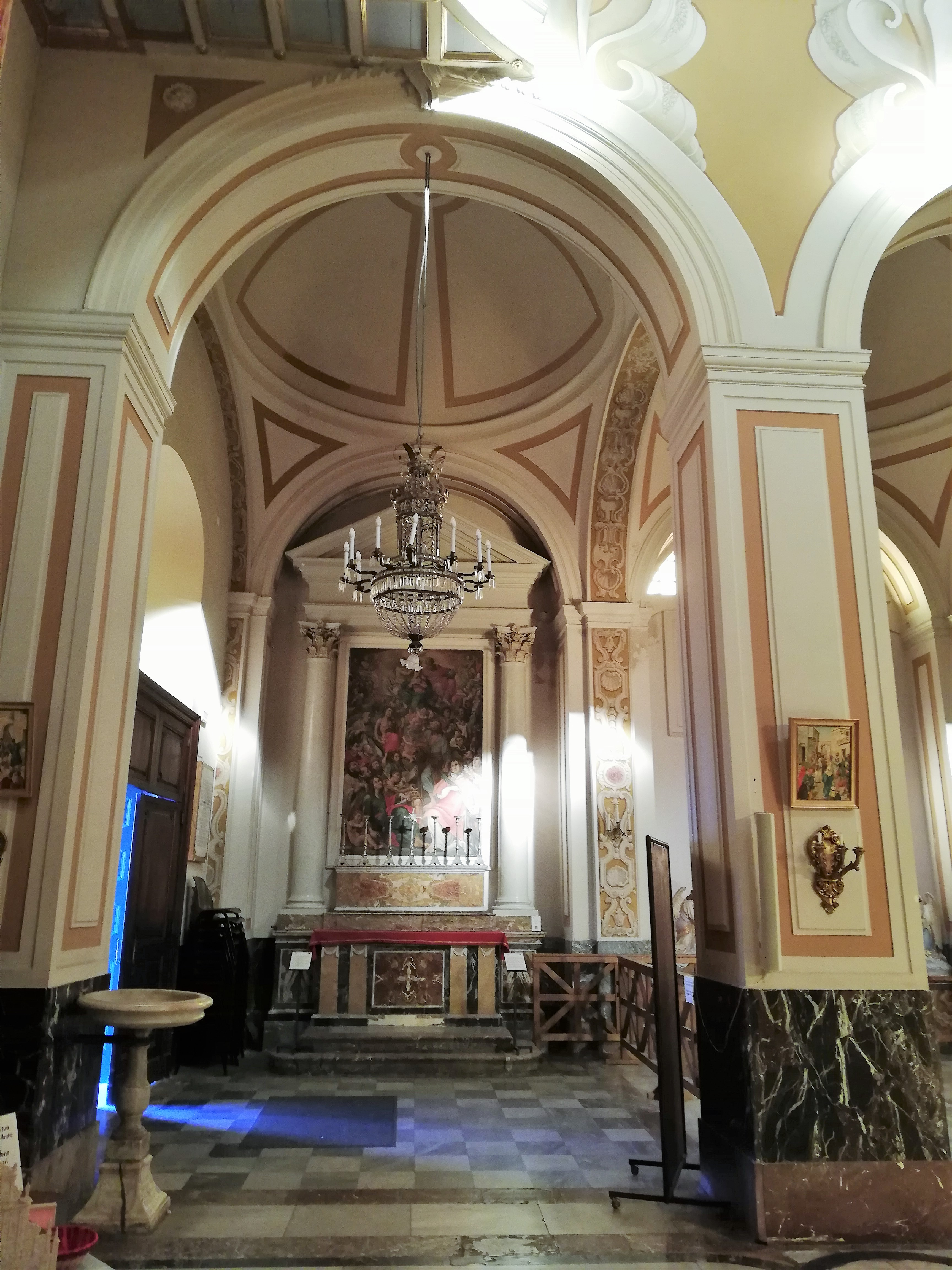 Cappella dell'Incoronazione della Vergine, Incoronazione della Vergine opera di Matteo Ragonisi.